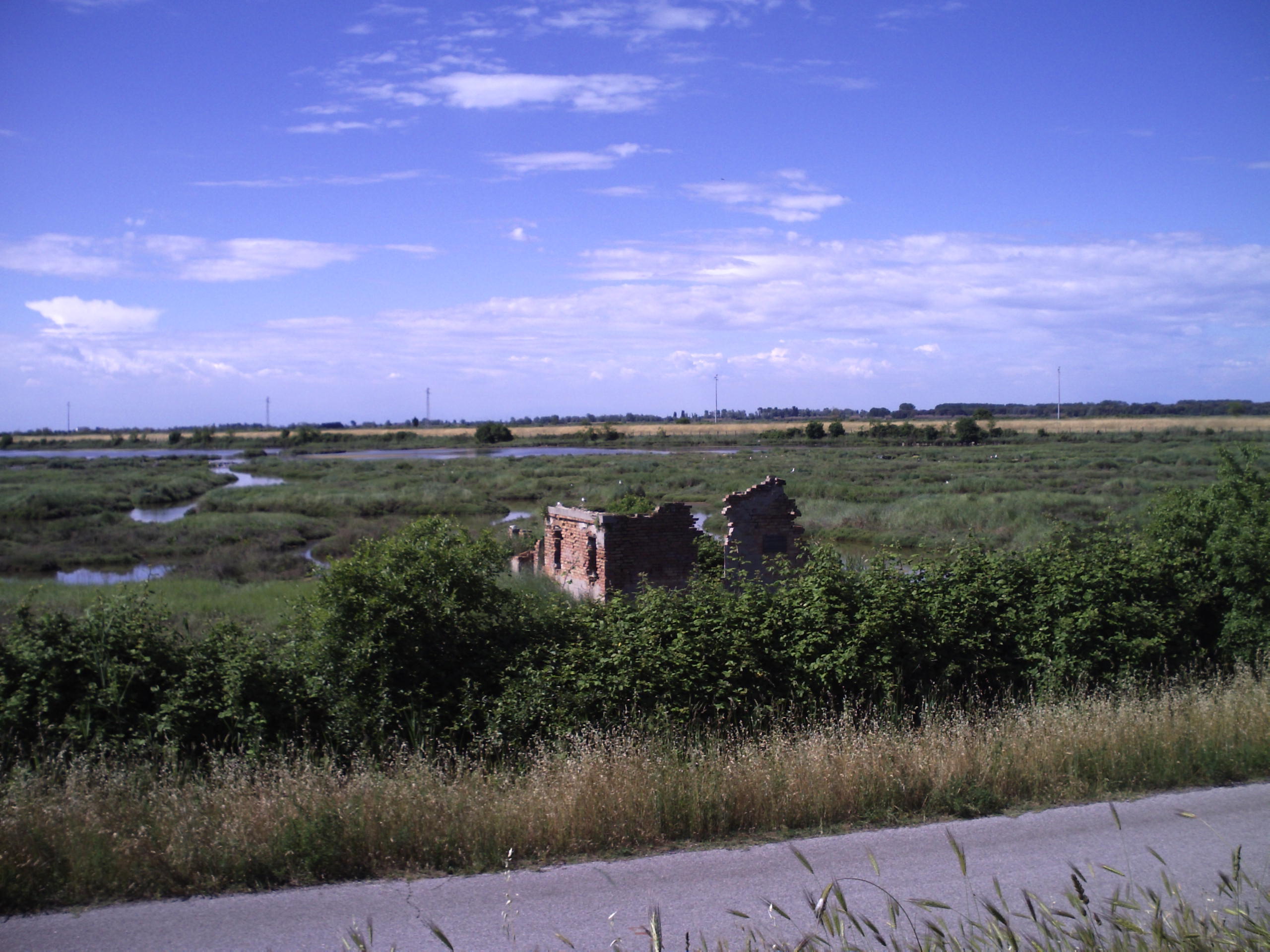 Uno scorcio di via delle Valli, nel comune di Rosolina (RO)